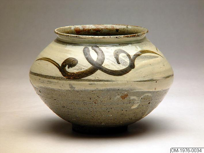 Korea, Östasiatiska Museet